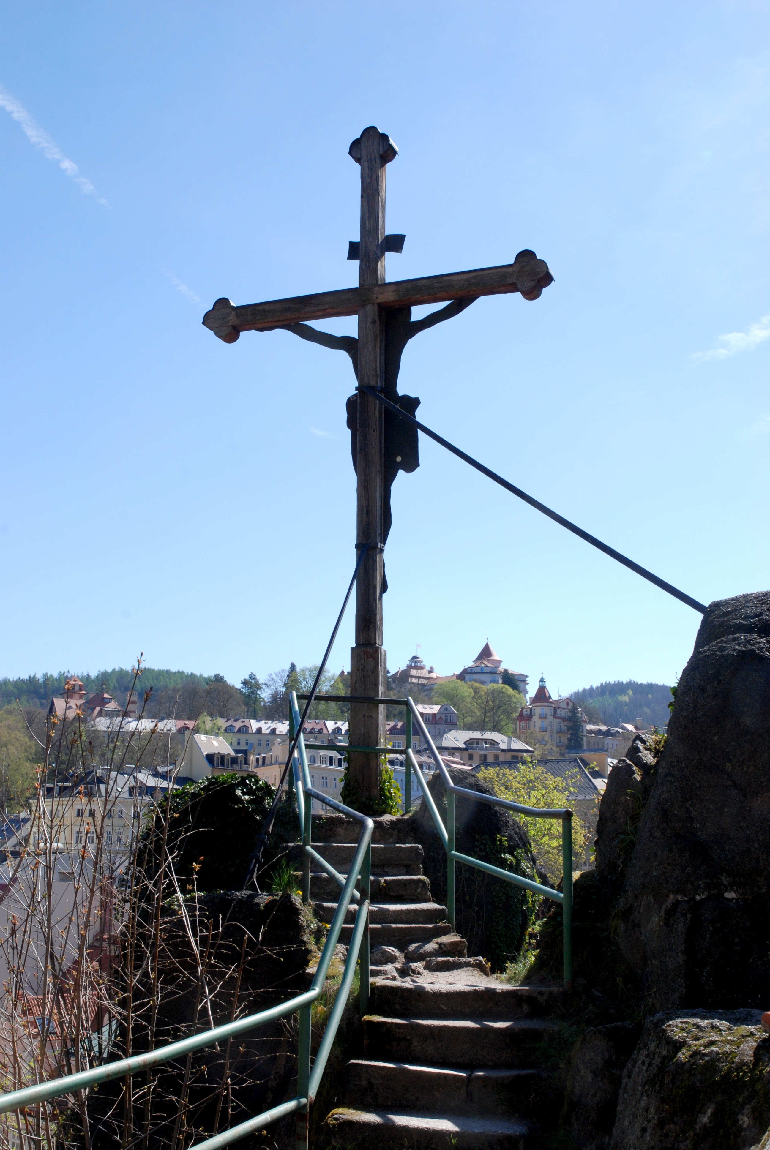 Keglewiczův kříž nad Grandhotelem Pupp v Karlových Varech, v pozadí hotel Imperial